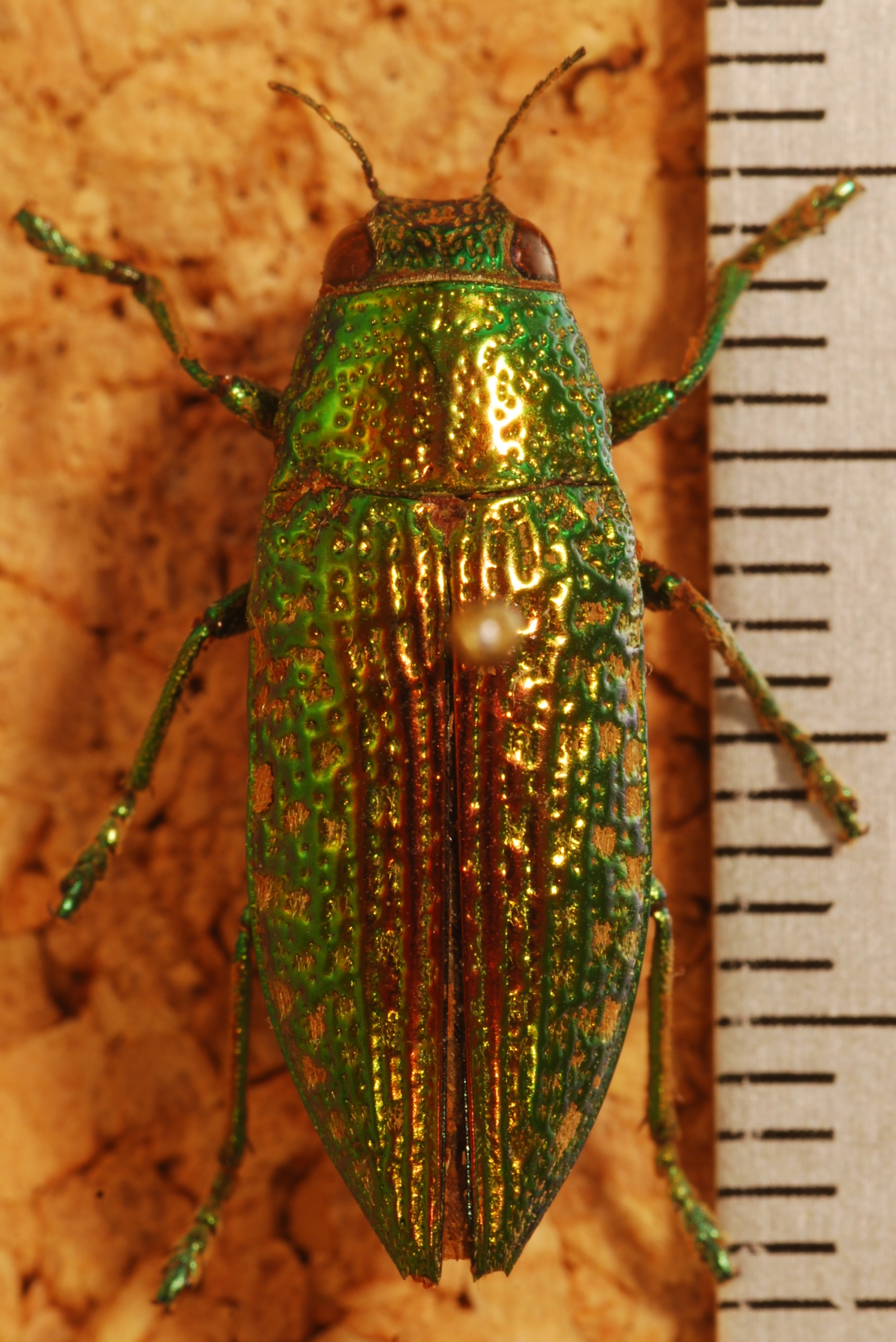 San Pedro Soteapan, Veracruz, MEXICO